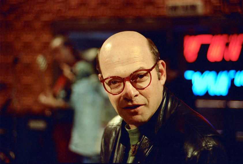 אולפן דורי באויר דורי בן זאב